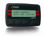 Ealert4, pager bi-bande commercialisé par e*Message